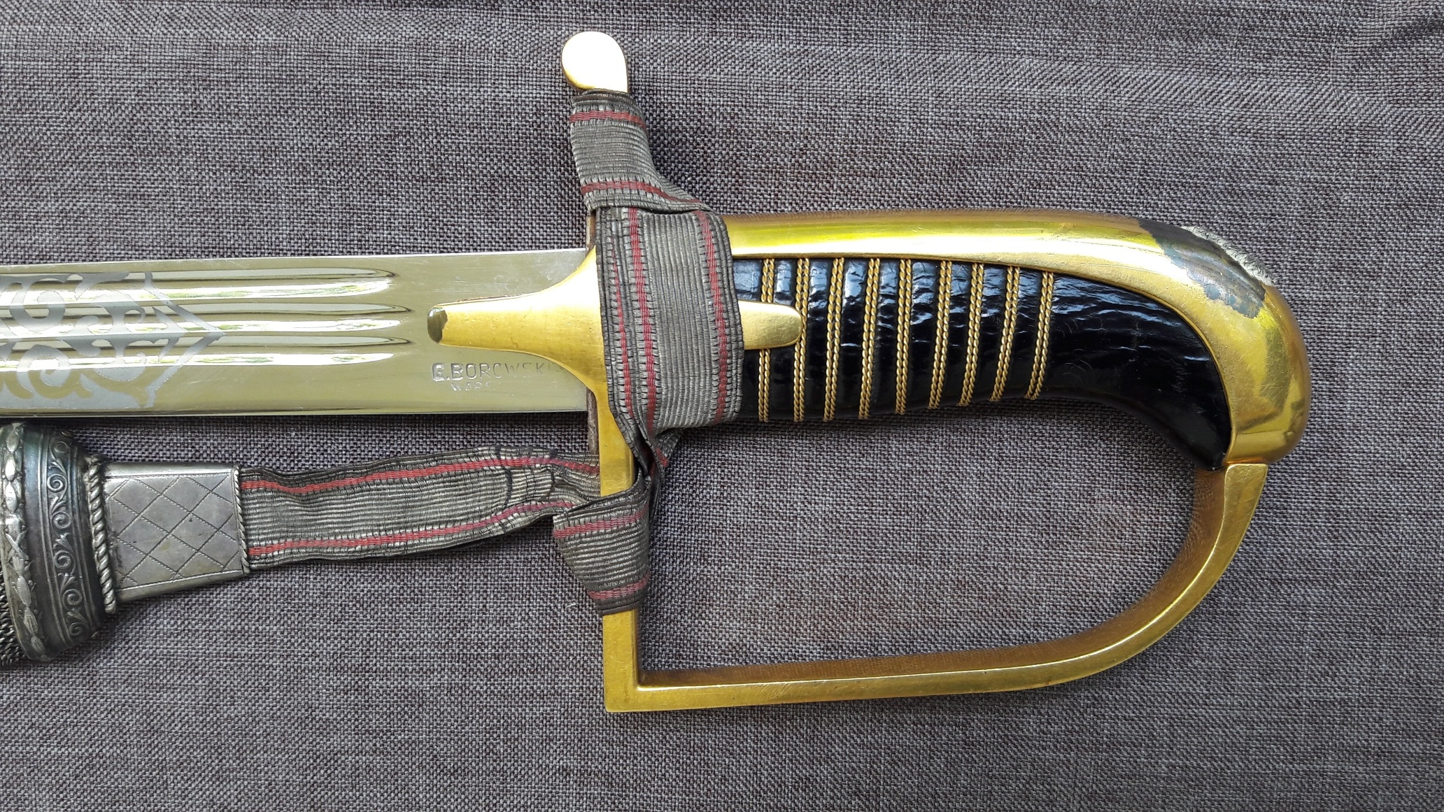 Polska szabla upominkowa wz.21 firmy G. Borowski; rok 1930.